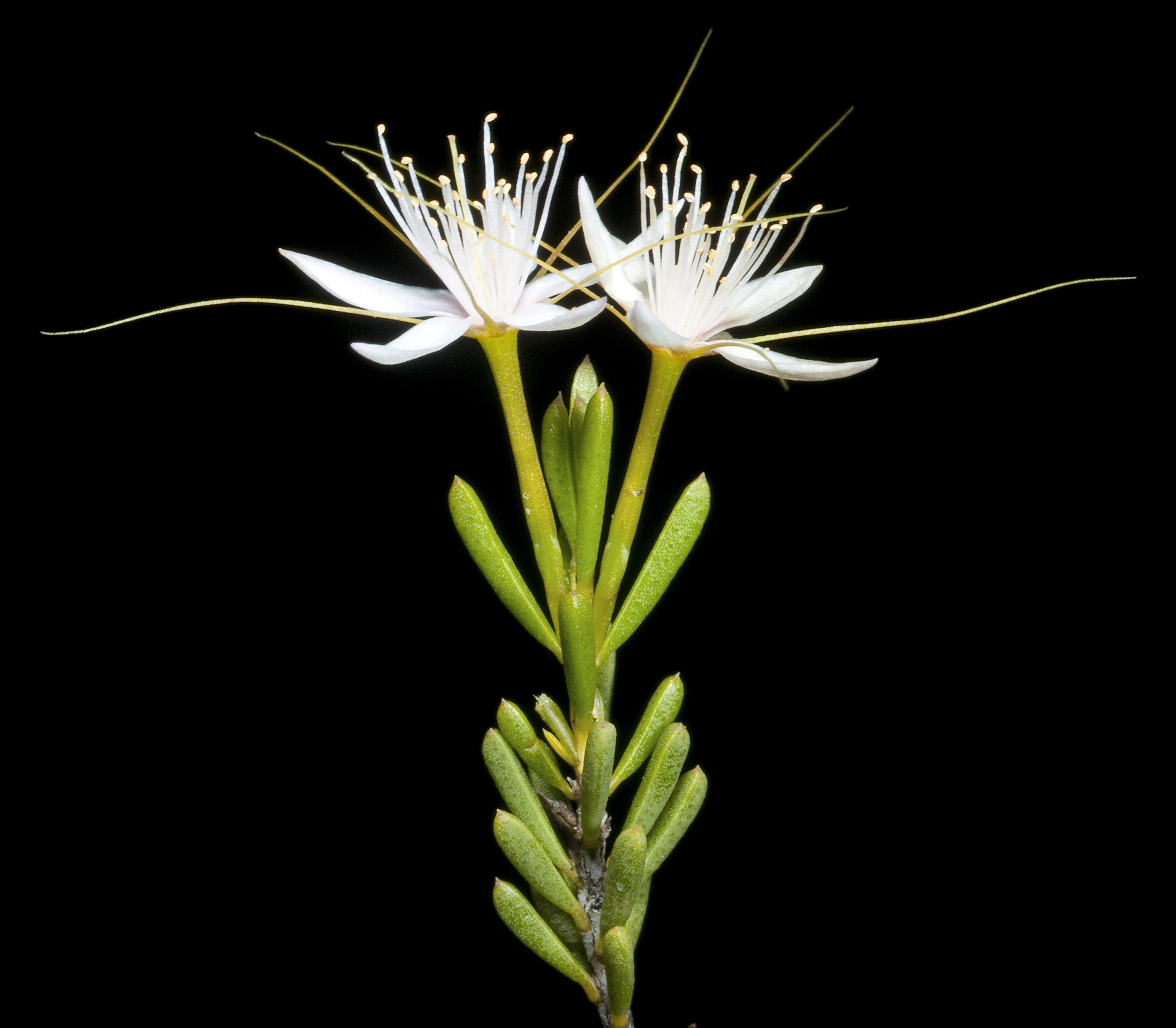 KRT4146